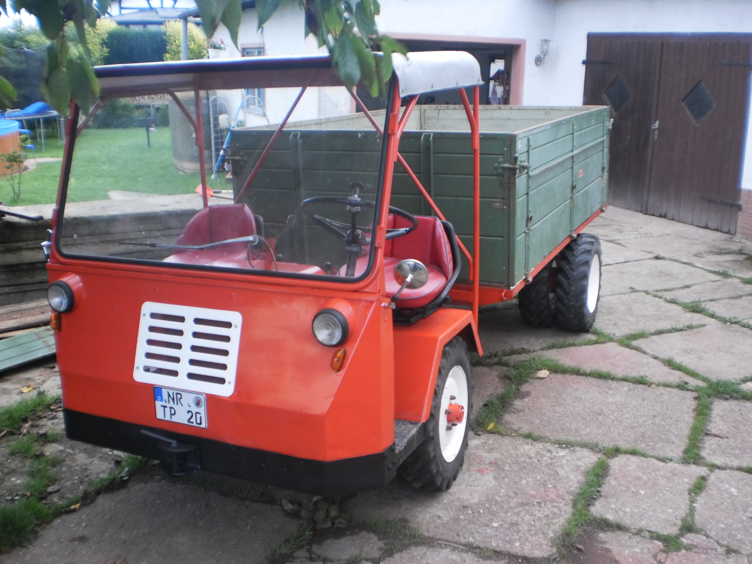 Aebi Tp 20